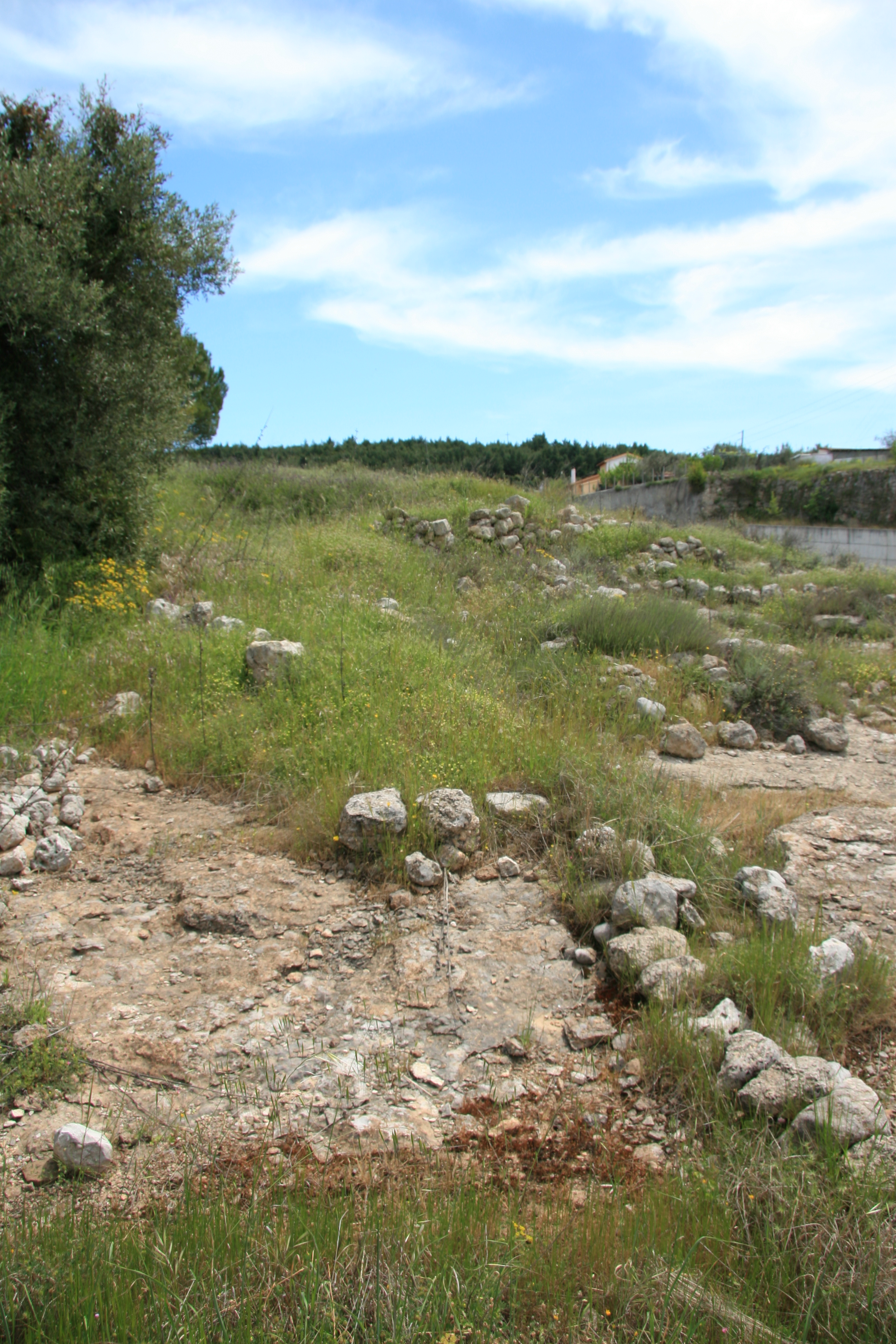 Ο Πρωτοελλαδικός οικισμός του Προσκυνά